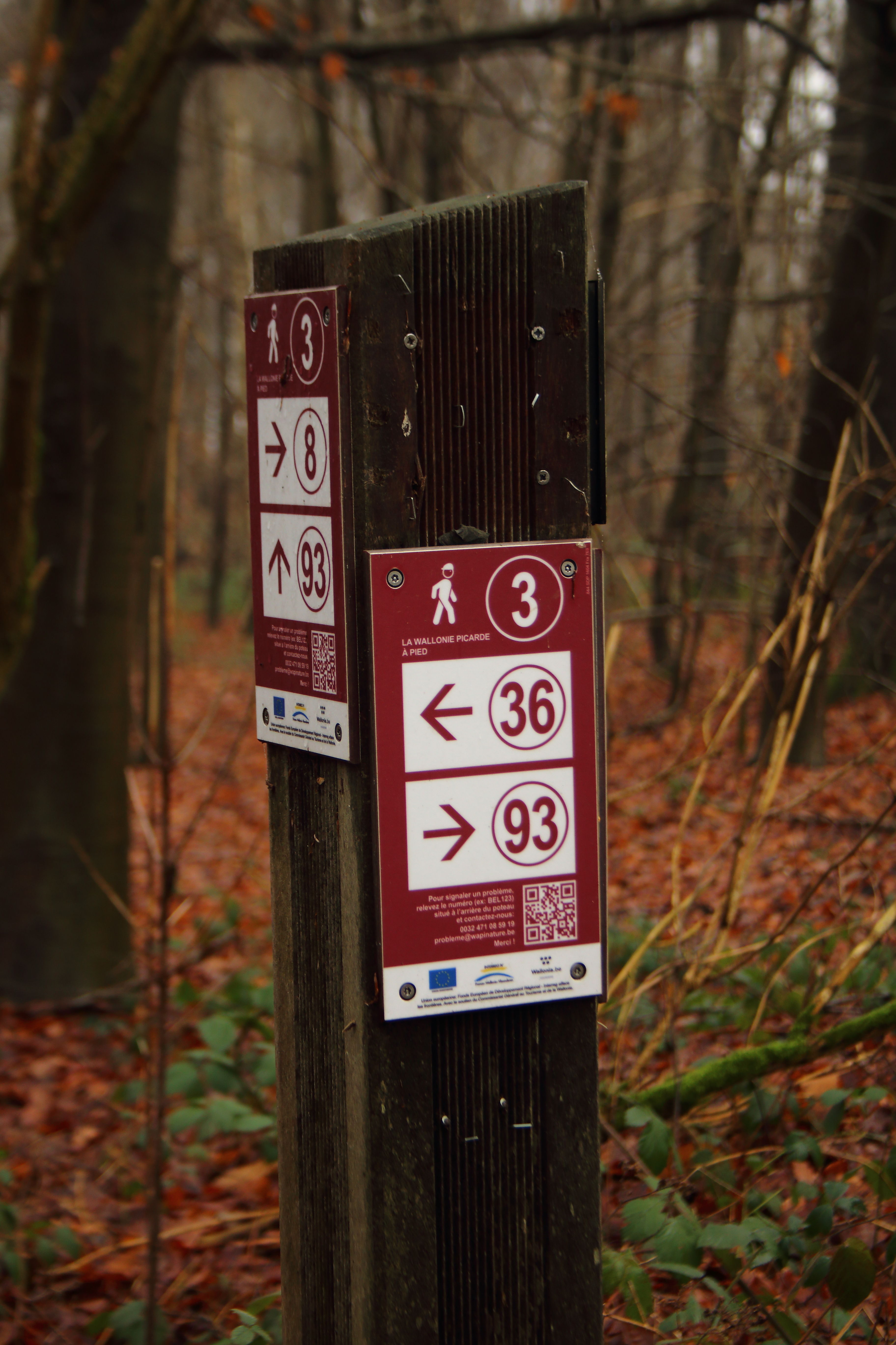 parc naturel du Pays des Collines, Henegouwen, Wallonië, België